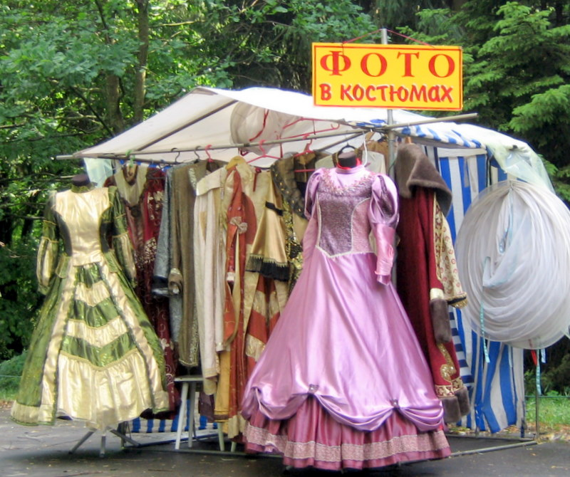 Фото в костюмах.